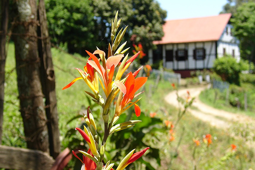 Teutônia, RS